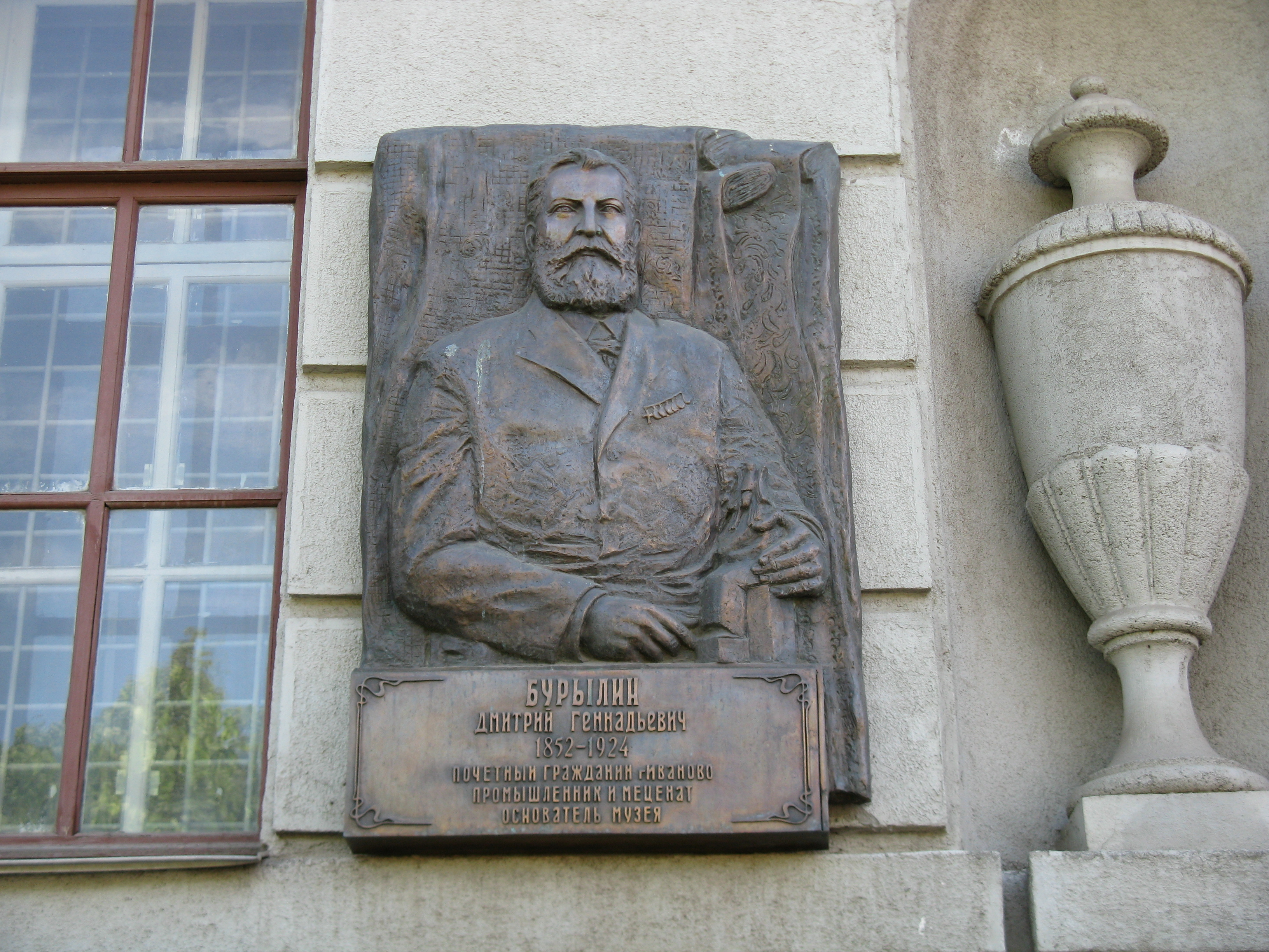 Мемориальная доска с портретом Дмитрия Бурылина на здании Ивановского краеведческого музея (г.Иваново).